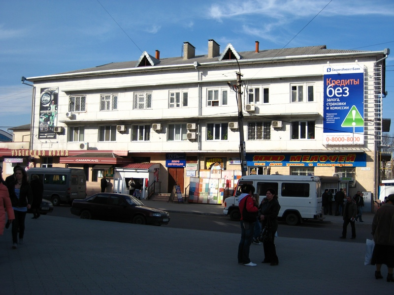 На этом месте располагалась синагога раби Иосолэ Юсим.